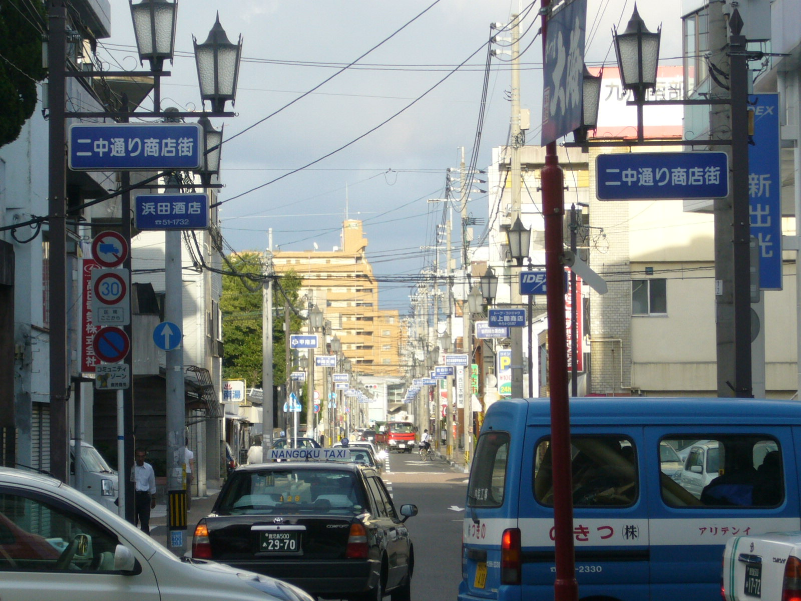 二中通り入口